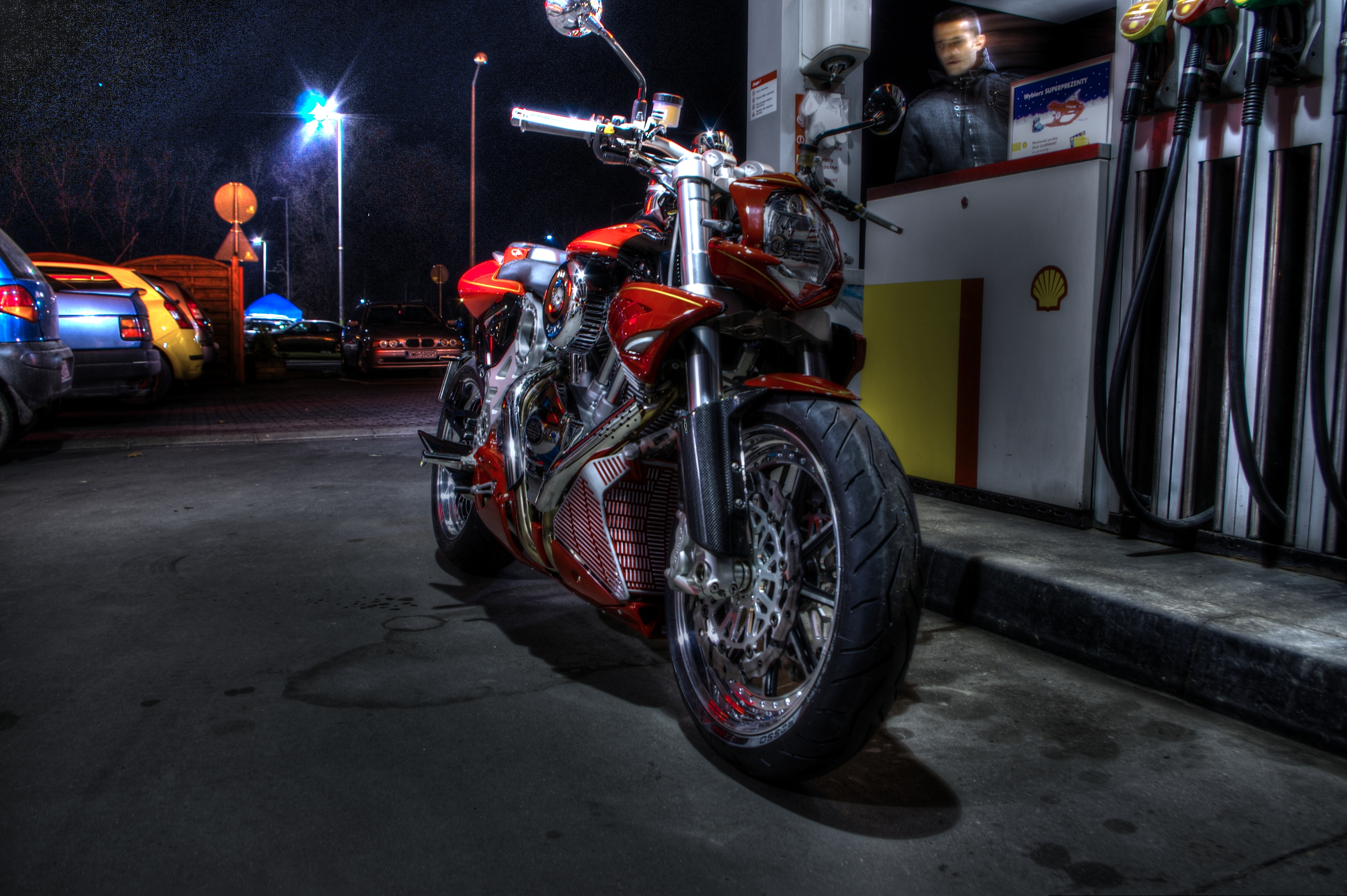 Ekskluzywny motocykl CR&S DUU włoskiej produkcji. Zdjęcia wykonano dzięki importerowi firmie K+K z Dzierżoniowa.